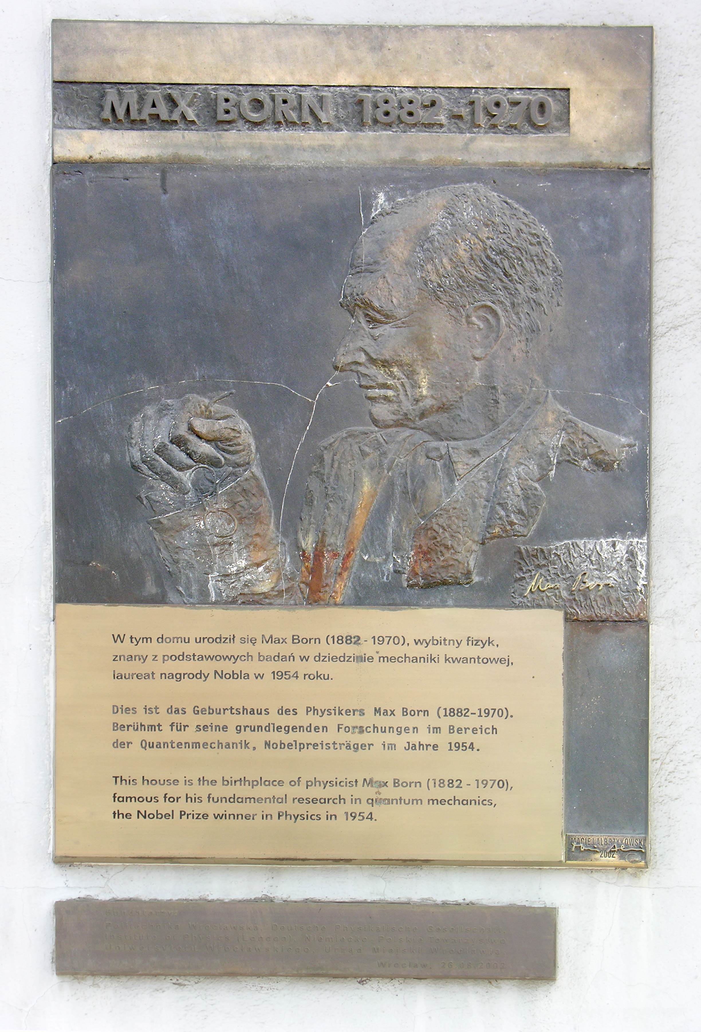 Tablica ku czci Maxa Borna we Wrocławiu, Plac Wolności 4